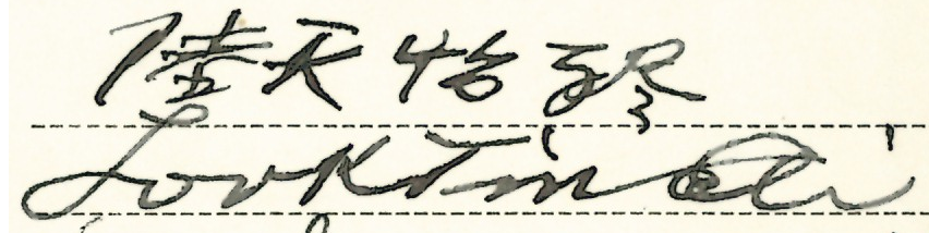 中文（中国大陆）: Look Tin Eli在1910年的签名